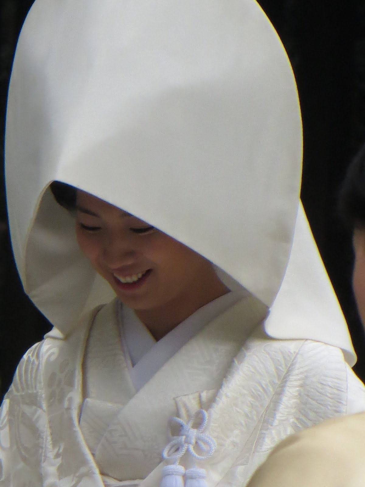 כלה ביום חתונתה, מקדש מייג'י , טוקיו , יפן